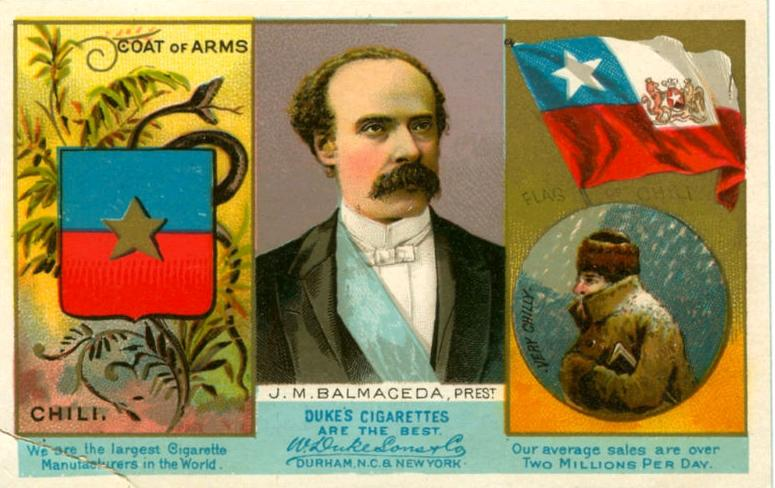 DUKE's Cigarettes BALMACEDA Coat of Arms & Flag CHILI